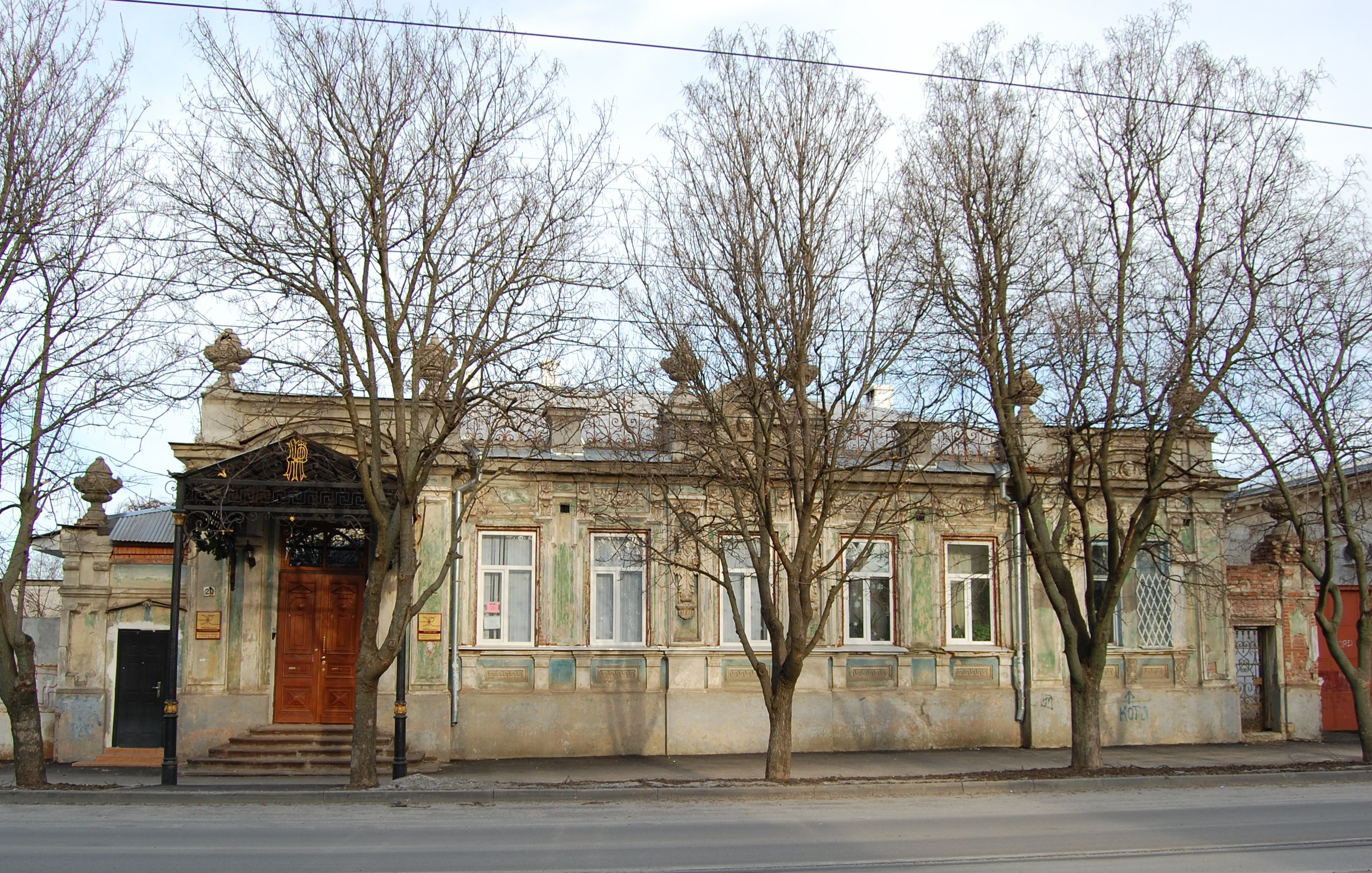 Фасад особняка "Дом Рафаиловича", Таганрог